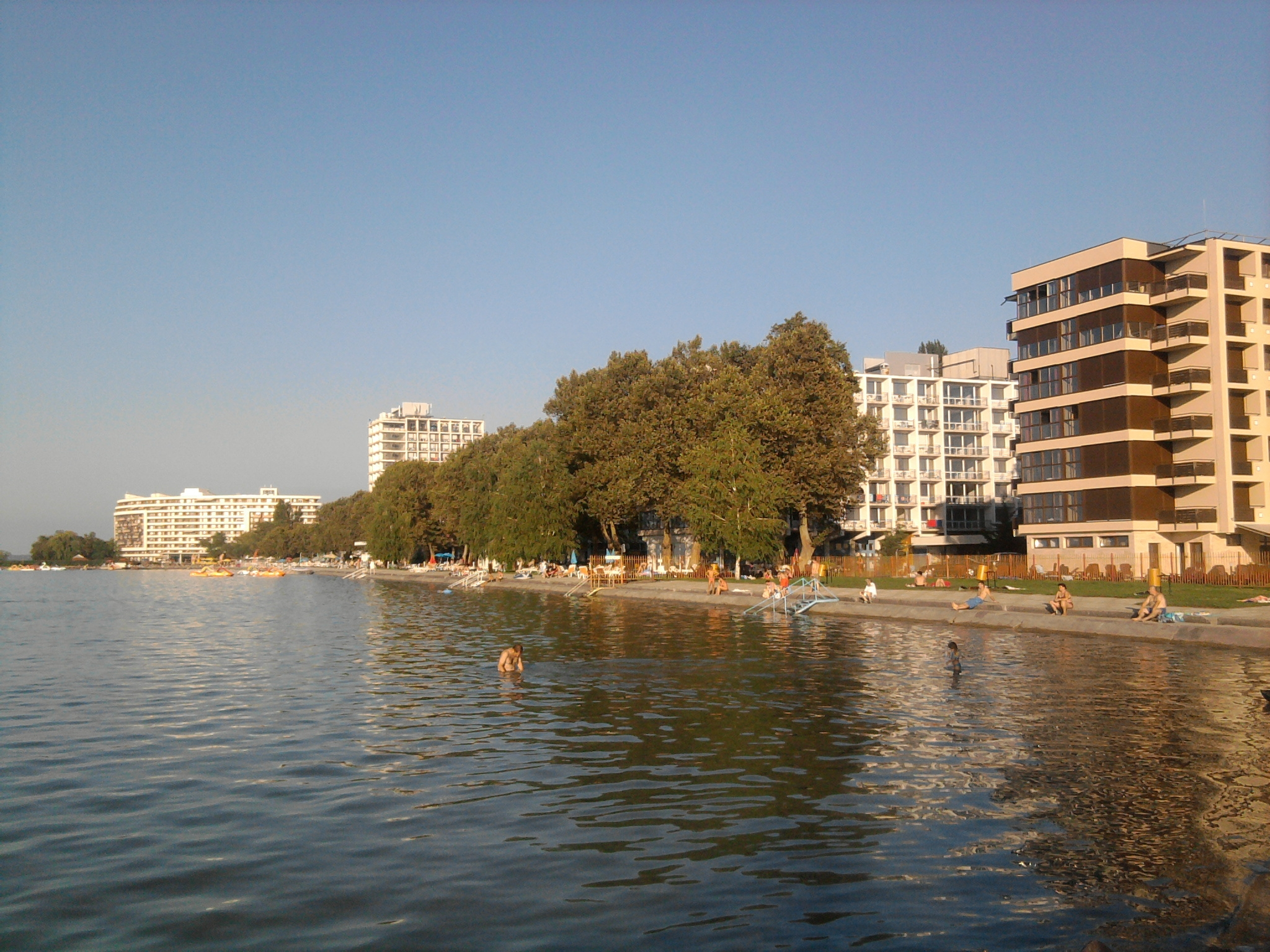 Aranypart,Szállodasor,Siófok